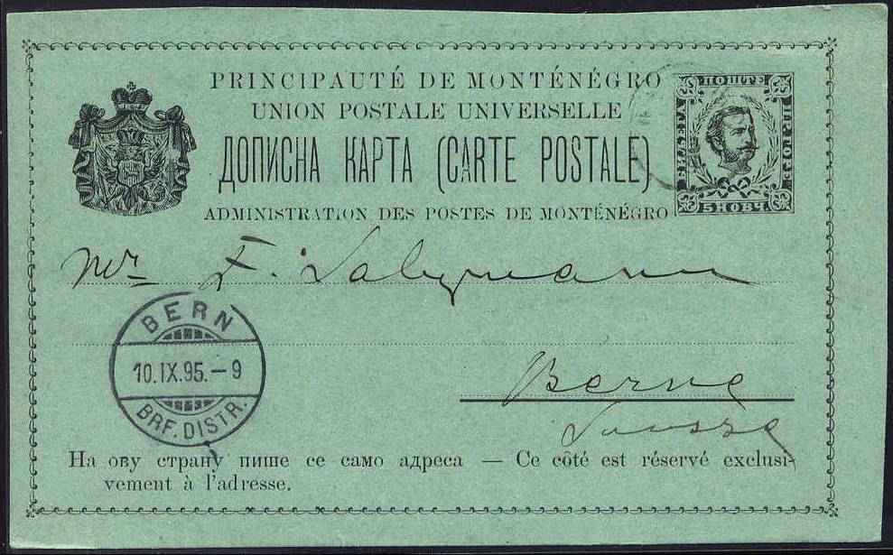 Почтовая карточка Черногории